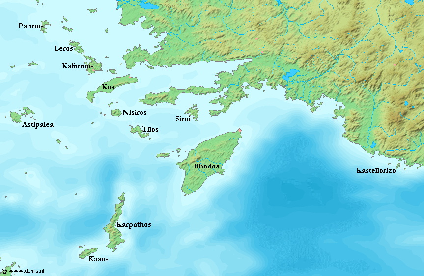 Karte der Dodekanes - erstellt mit demis.nl, selbst bearbeitet, pd.